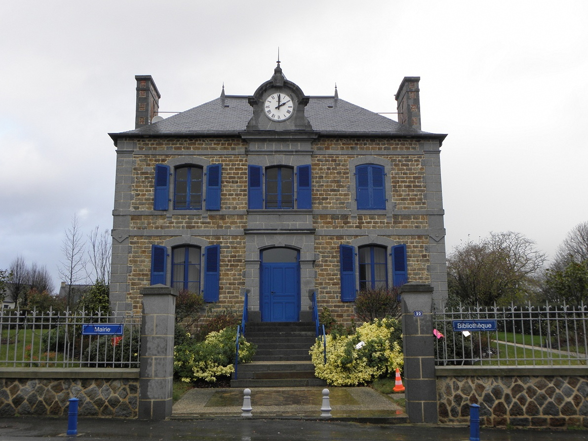 Mairie de La Baussaine (35).